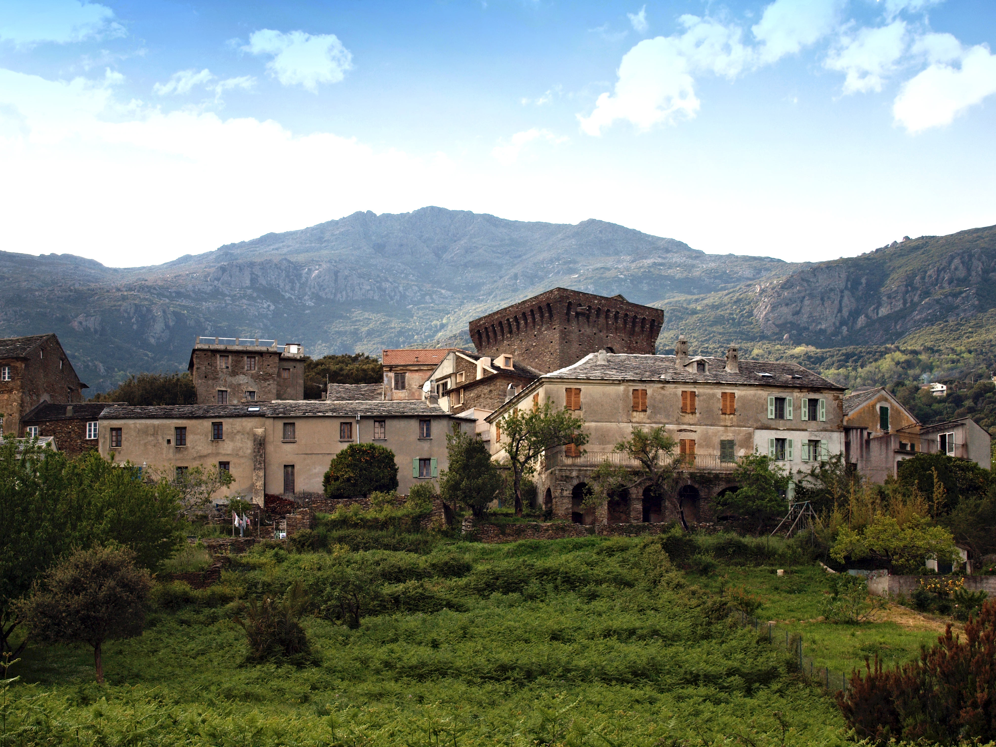 Pietracorbara, Cap Corse (Corse) - Orneto, vieux village avec sa remarquable tour carrée, avec au fond, la ligne de crête du Monte Alticcione